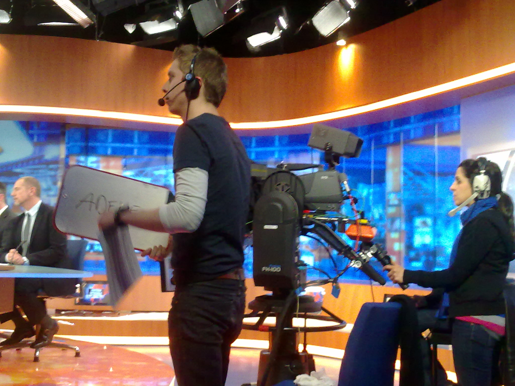 le studio du Journal télévisé de RTL TVI (Bruxelles) : l'équipe technique dans le studio. Chef de plateau et camera-woman. Mars 2012.